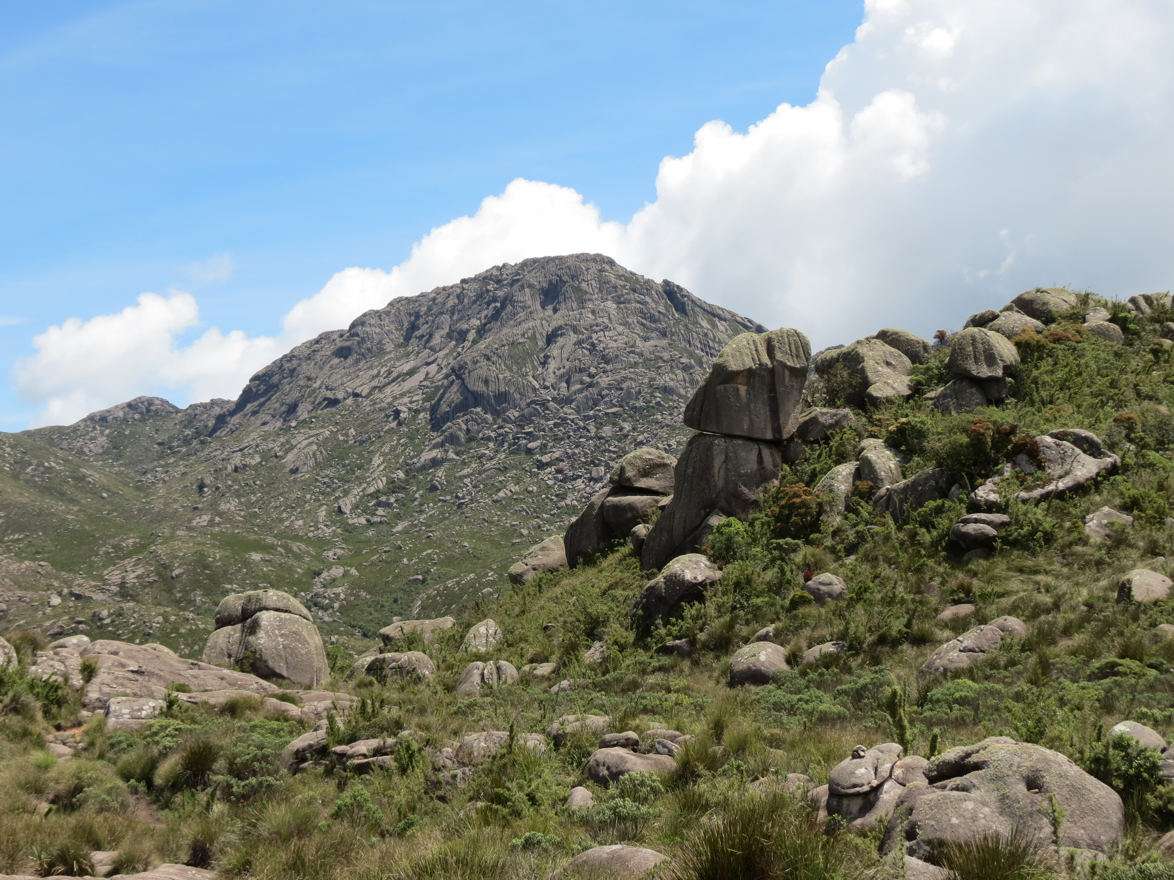 foto tirada em janeiro de 2014 no Parque Nacional de Itatiaia